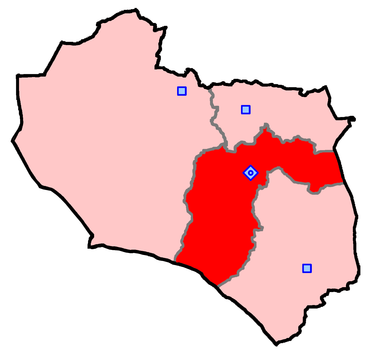 حوزهٔ انتخاباتی بیرجند و درمیان و خوسف برای انتخابات مجلس شورای اسلامی